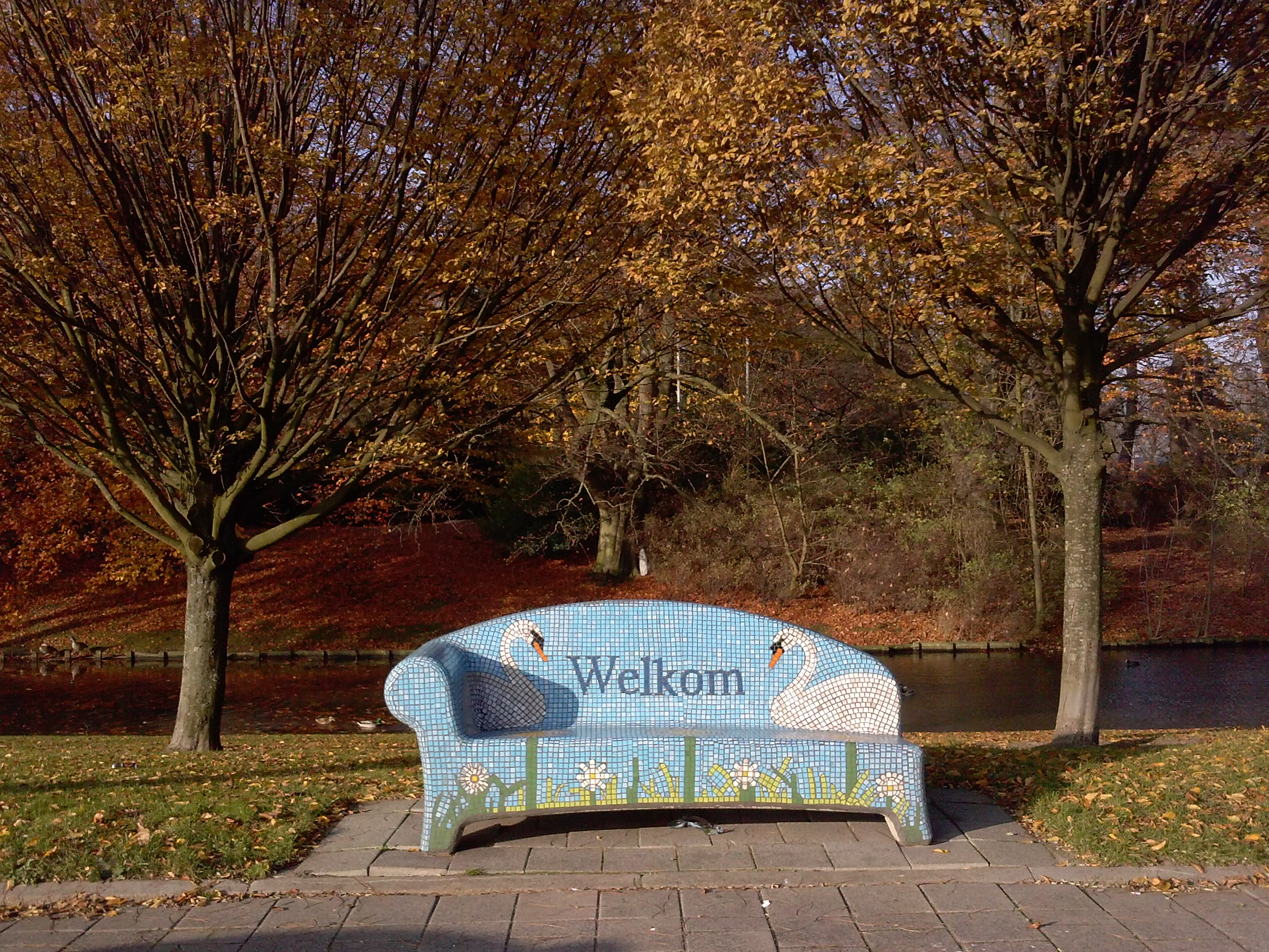 Een zitbankje met twee zwanen op de Kerkhoflaan in Nieuw-Crooswijk